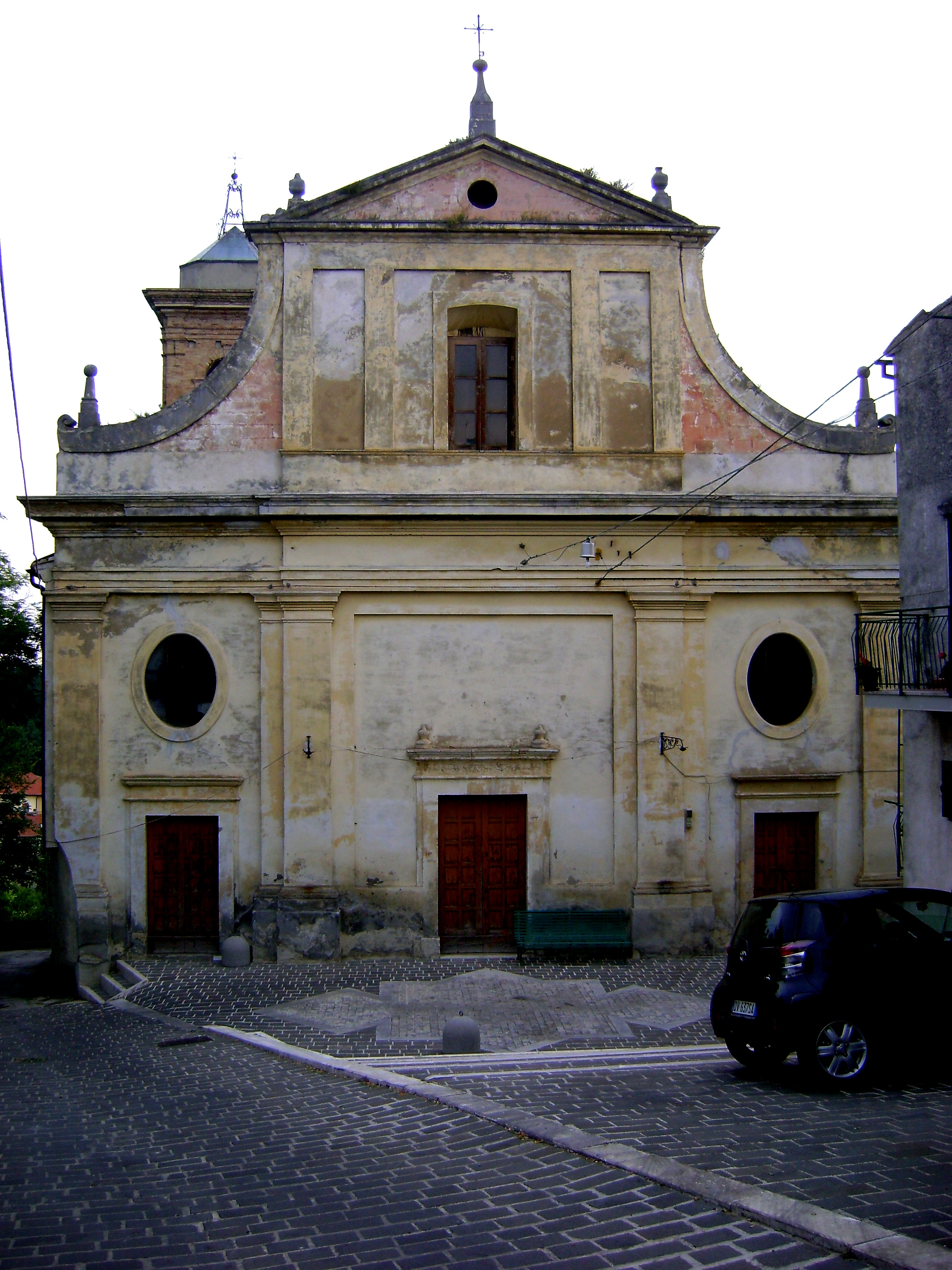 Facciata della chiesa di San Giovanni. Rapino, Chieti.